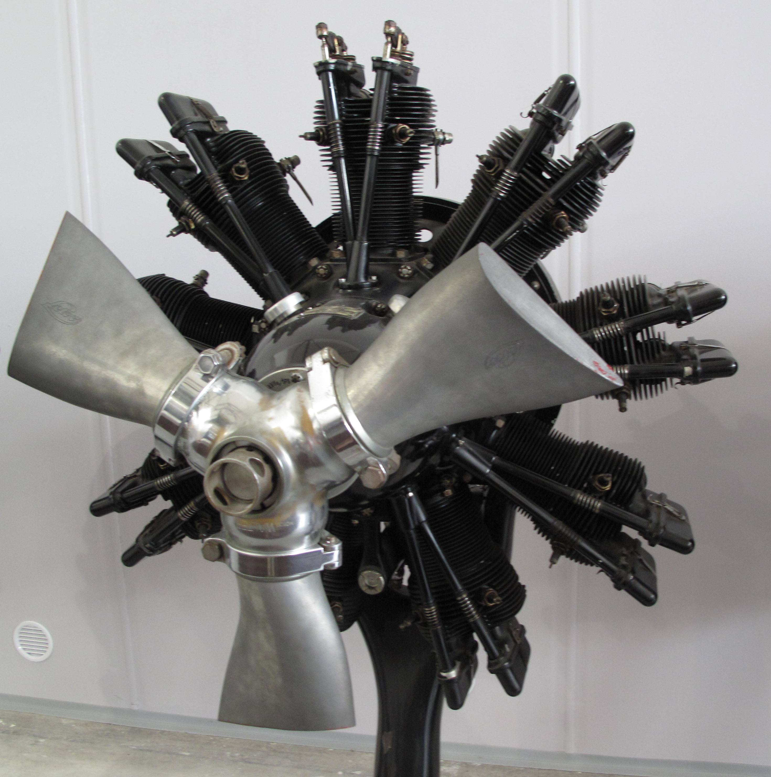 Letecké muzeum Kbely